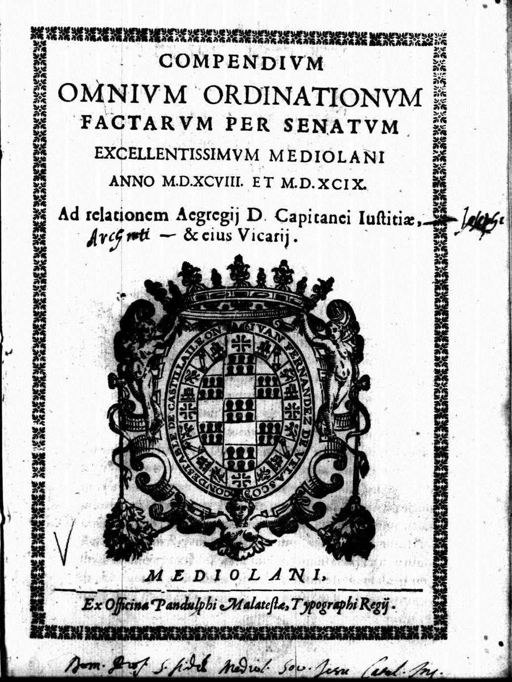 Frontespizio